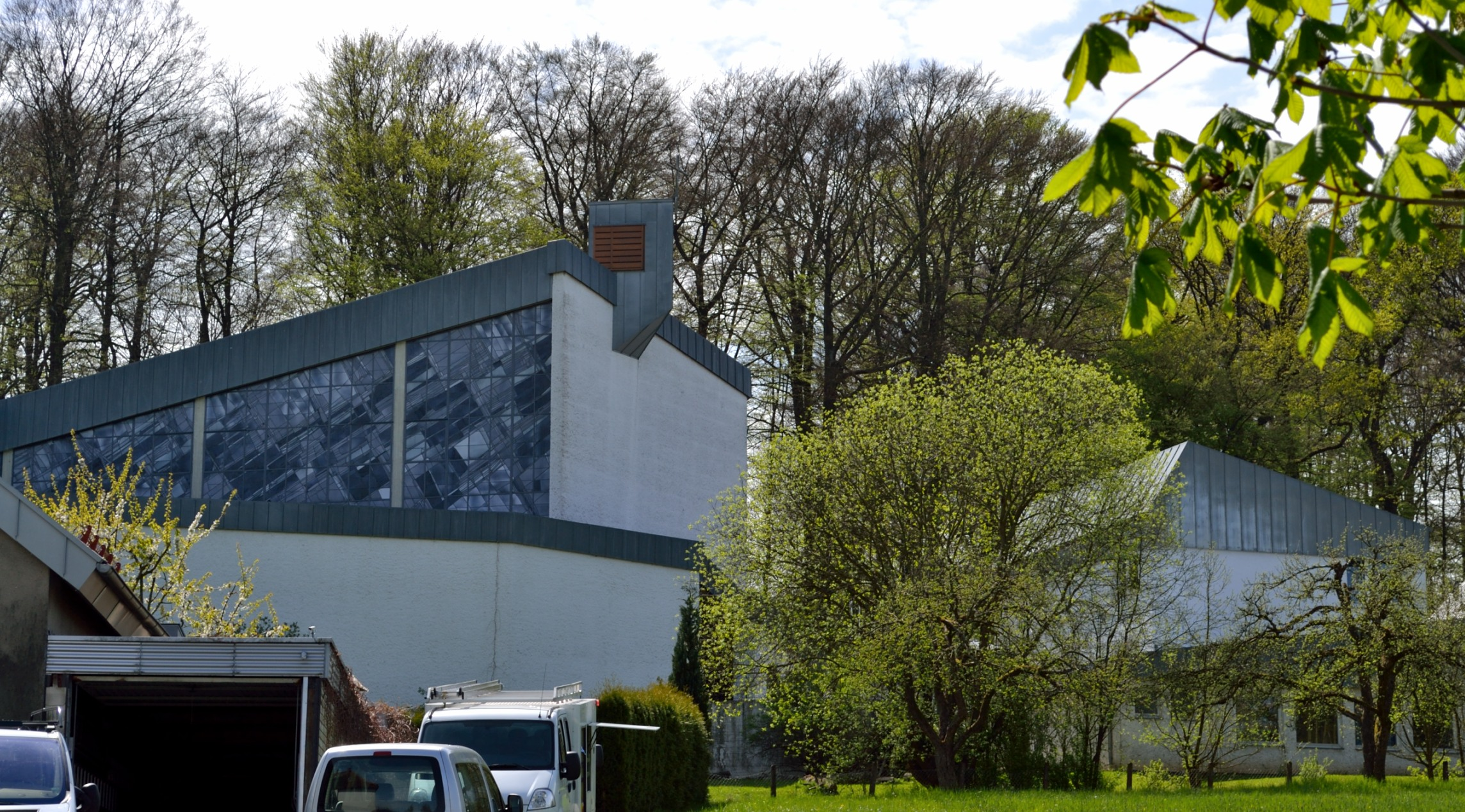 Katholische Kirche im Detmolder Ortsteil Berlebeck